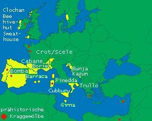 Gewölbe